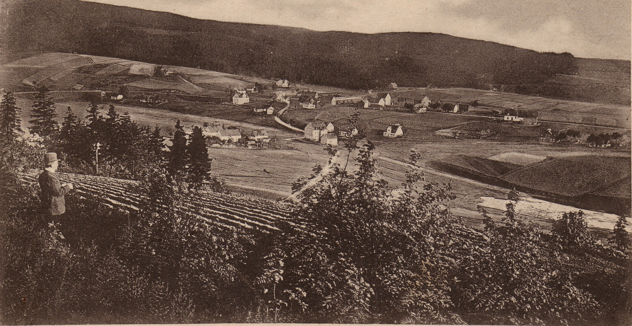 Schönheide im Erzgebirge. Blick vom Fuchsstein (722 Meter) nach Nord-Nord-West zum Ortsteil Neuheide, am linken Rand der bewaldete Hang des Kuhbergs. Deutlich zu sehen sind die seit um 1600 gerodeten landwirtschaftlich genutzten Flächen. Quer durch das Bild ist der Verlauf der Eisenbahnstrecke von Wilkau-Haßlau nach Carlsfeld zu sehen.